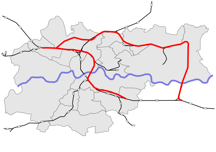 kolej obwodowa w Krakowie